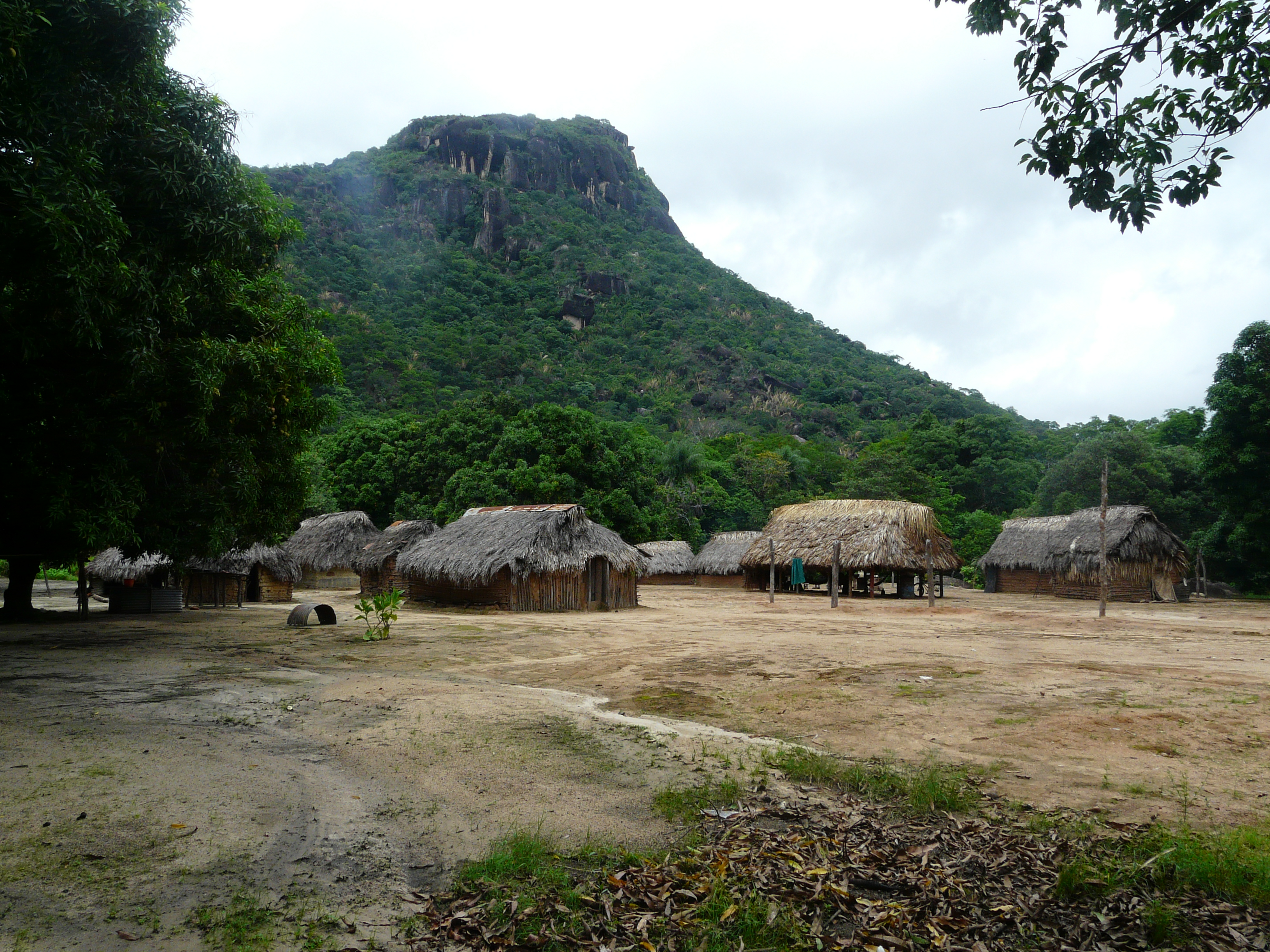 Comunidad Panare de Corozal